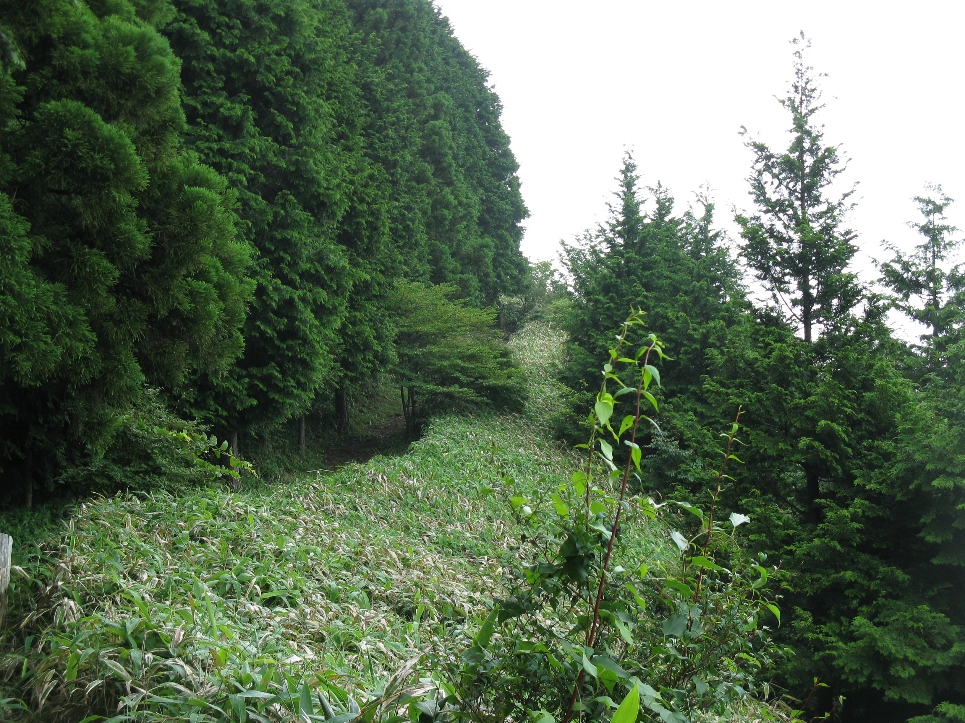 中葛城山 山頂